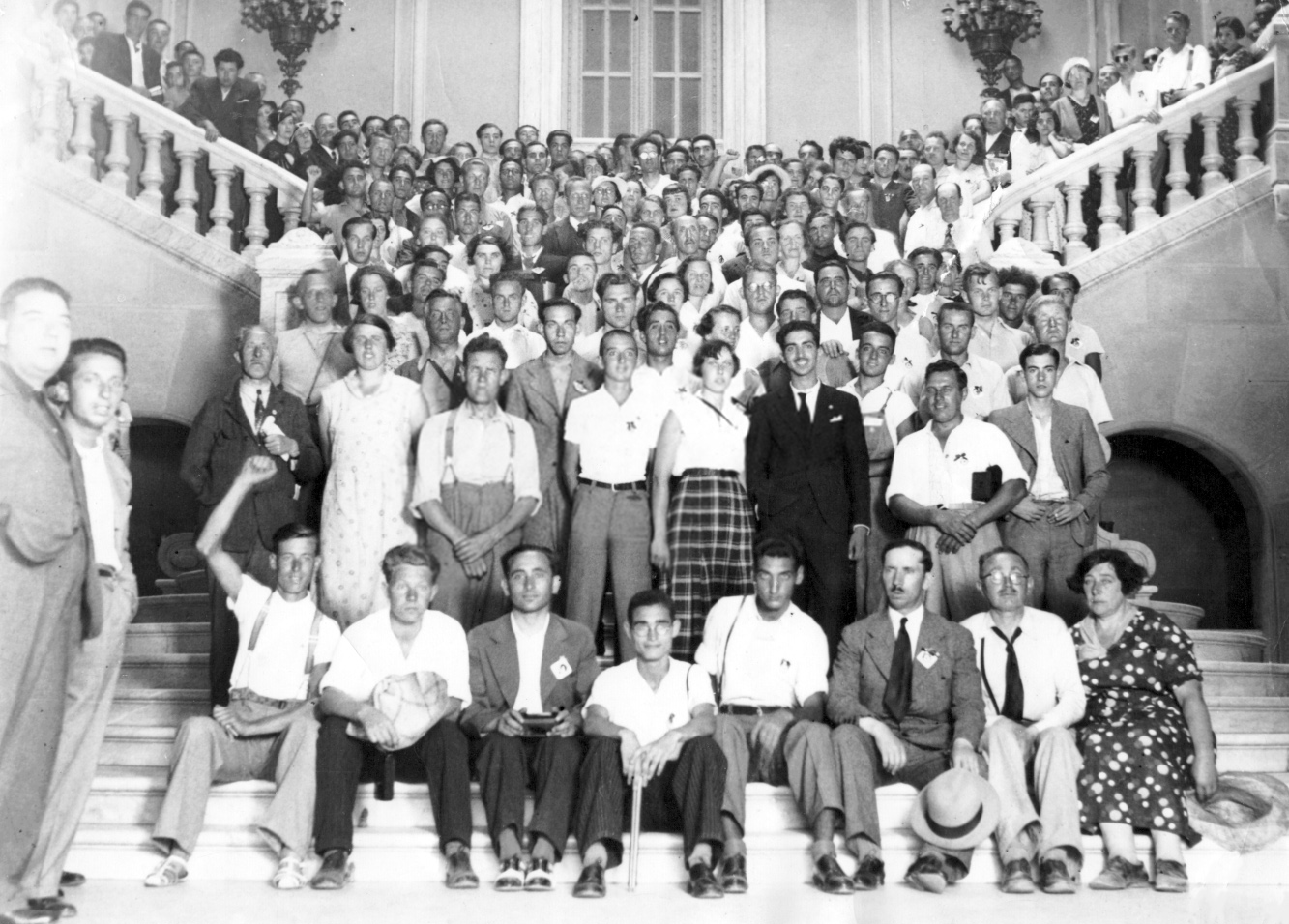 Komuna foto de la partopenantoj de SAT-kongreso en Valencio, 1934